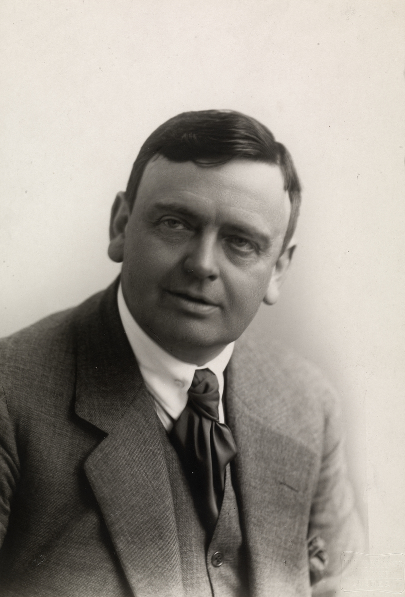 Hauk Aabel, portrett, mann, skuespiller, brystbilde.